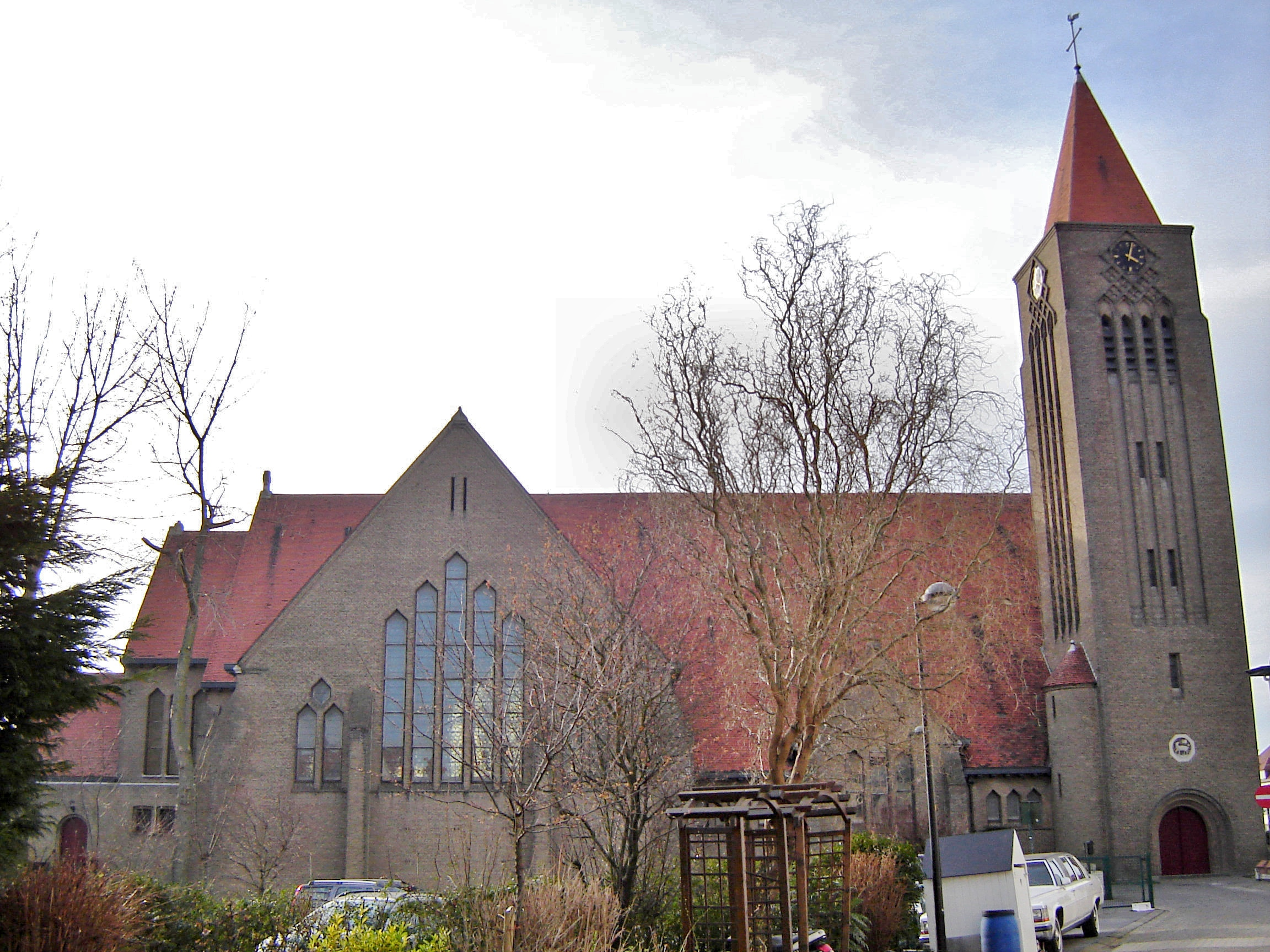 Heilige Familiekerk in Duinbergen Church of the Holy Family in Duinbergen. Duinbergen, Knokke-Heist, West Flanders, Belgium